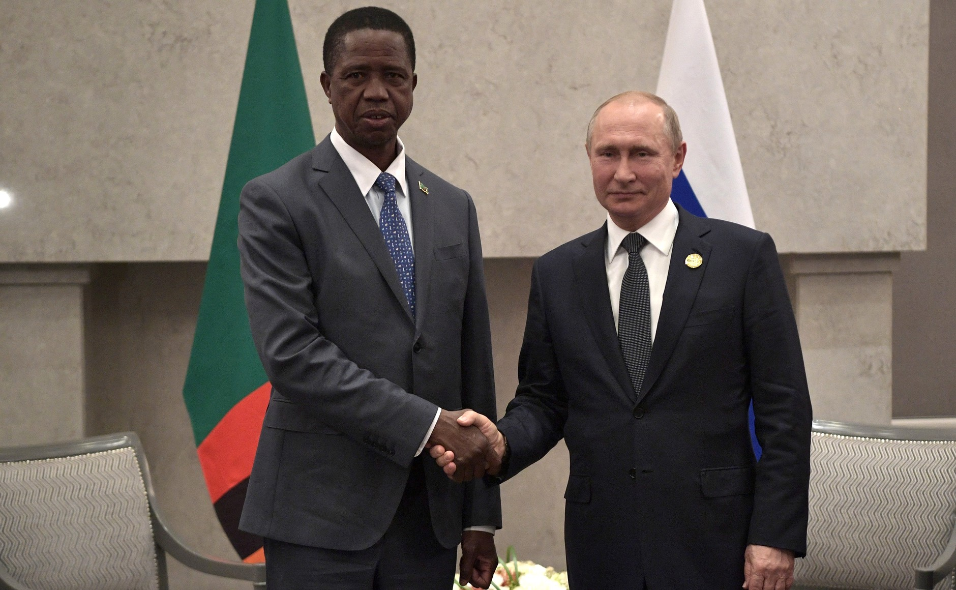 С Президентом Замбии Эдгаром Лунгу.